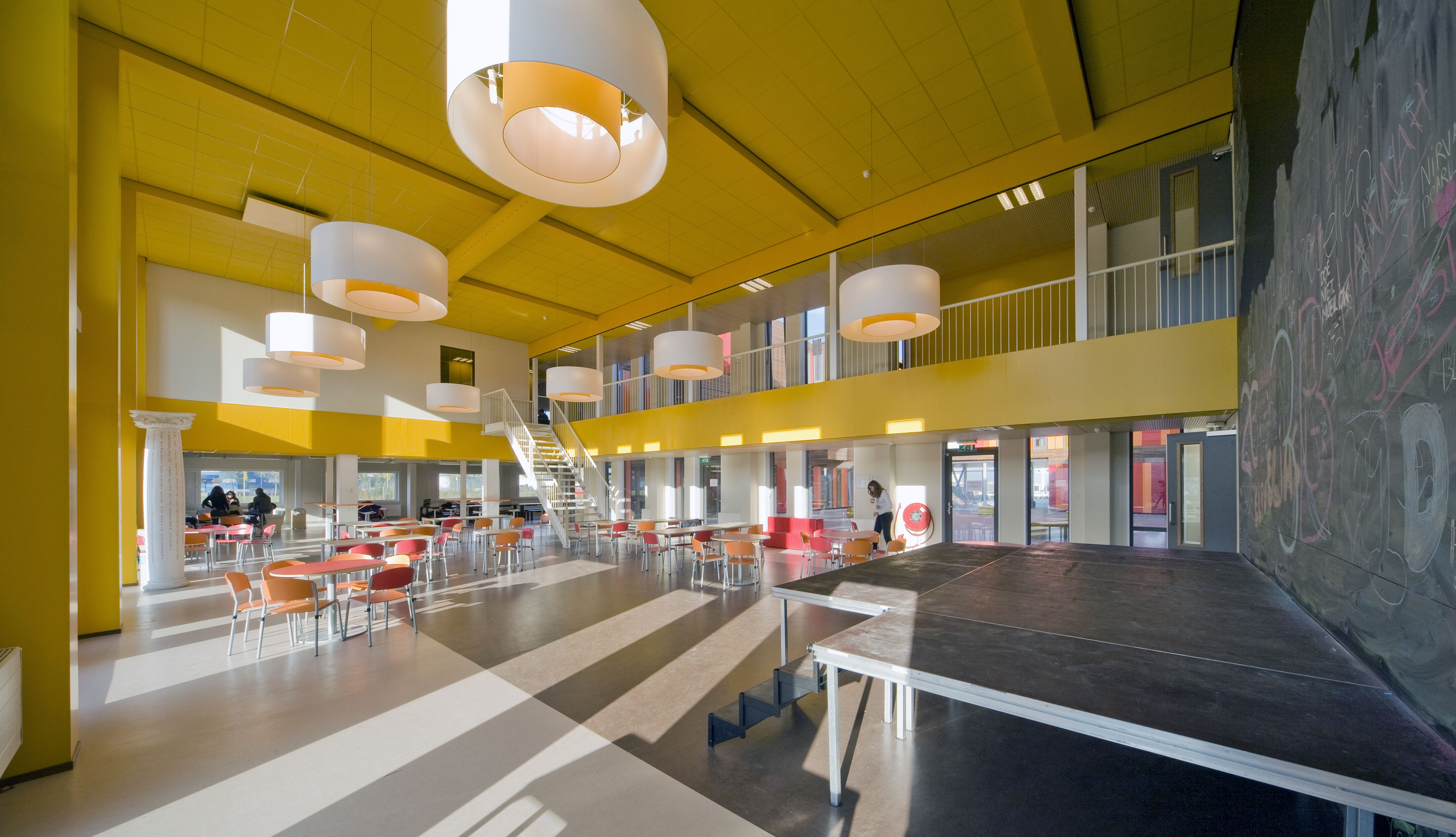 interieur van het 4e Gymnasium